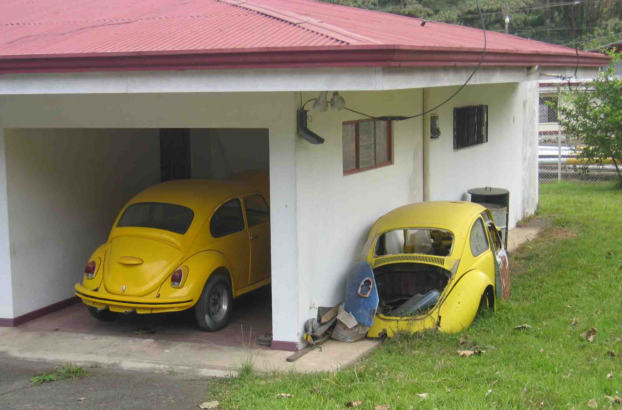 Beetle shredding its skin